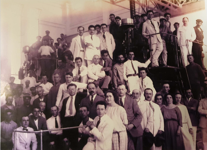 יום פתיחת תחנת הכוח של חברת החשמל בתל אביב